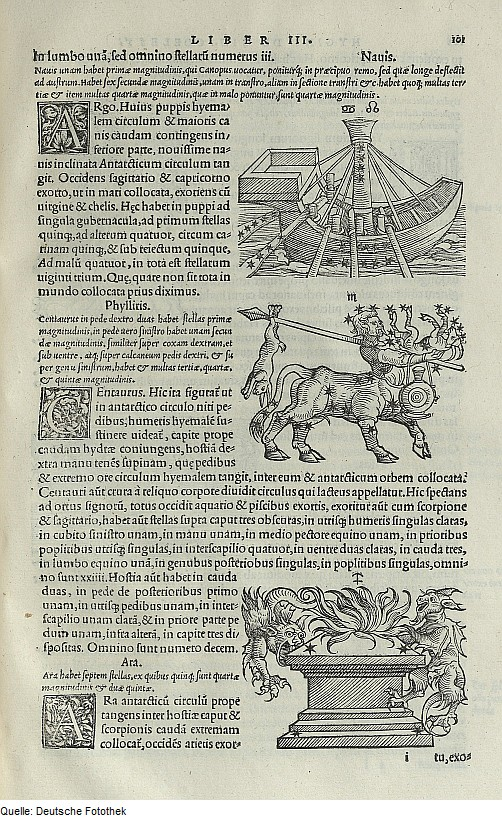 Original image description from the Deutsche Fotothek Astronomie & Sternbild